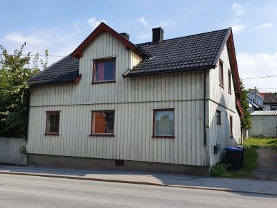 Et bilde av Klostergata 22 i Moss. Huset er av Sveitserstil.